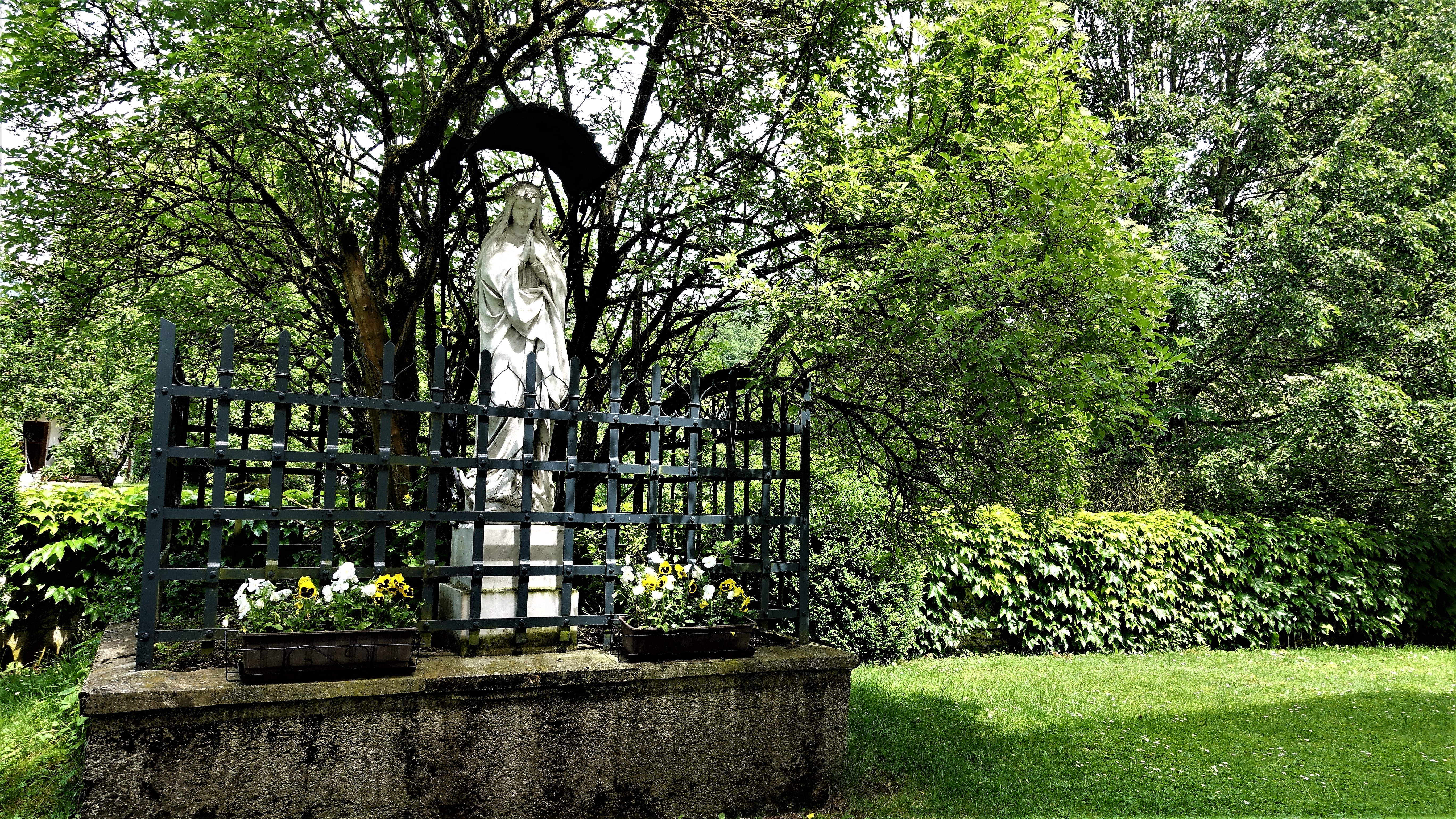 Maria unter dem Fliederbusch, Wallfahrtsort Maria ThalheimThis is a photograph of an architectural monument.